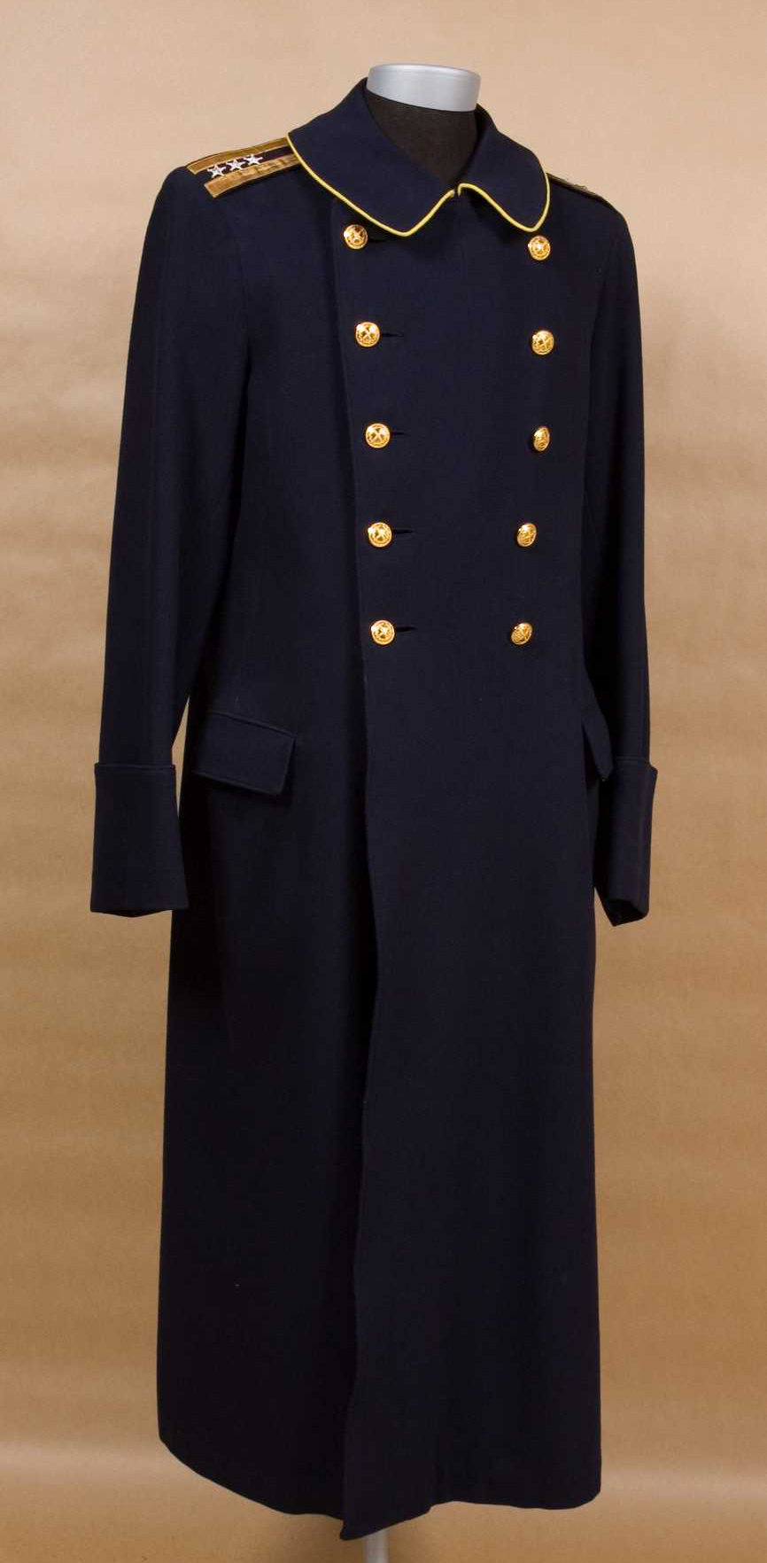 Kappa m/1872 för officer (överste) vid Generalstabskåren.